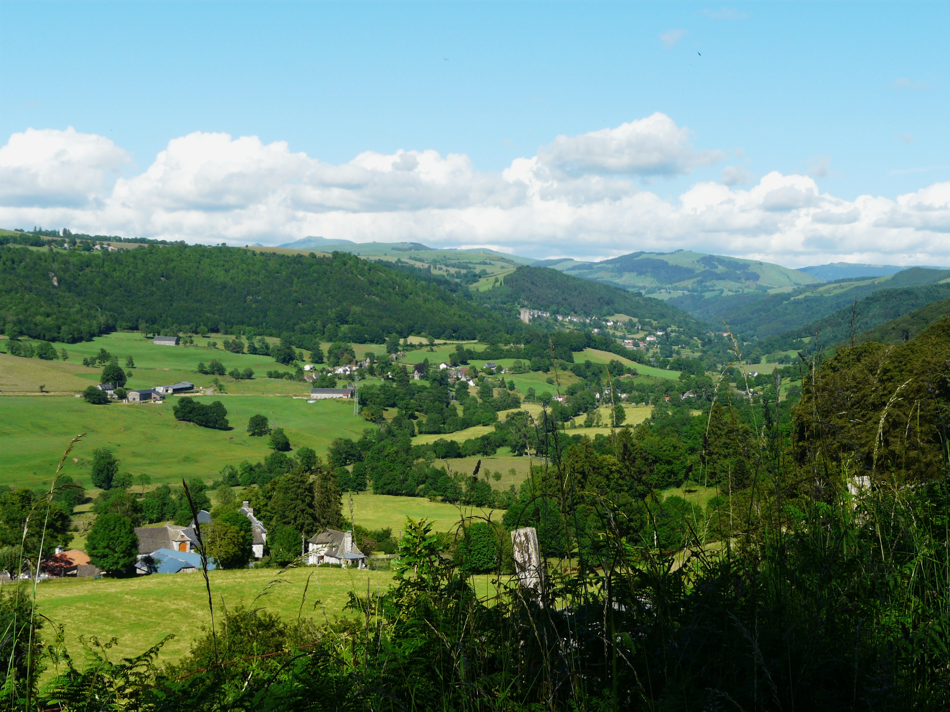 La vallée de la Doire vue depuis la route départementale 922, Saint-Cernin, Cantal, France. Vue prise en direction de l'amont.